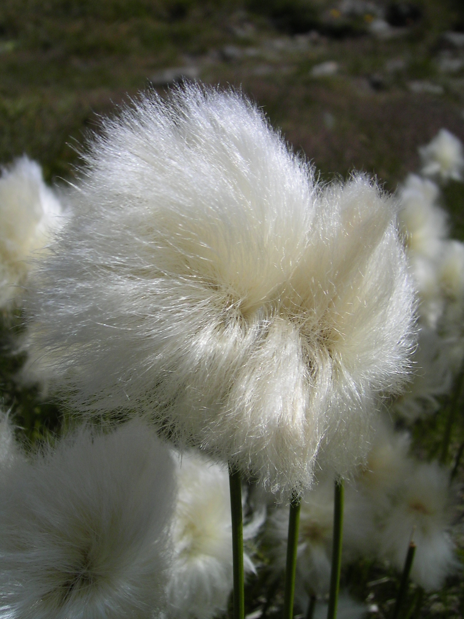 (en) Eriophorum scheuchzeri (de) Scheuchzers Wollgras (Eriophorum scheuchzeri) Place/Ort: Berner Oberland, CH. In der Nähe der Planplatten.